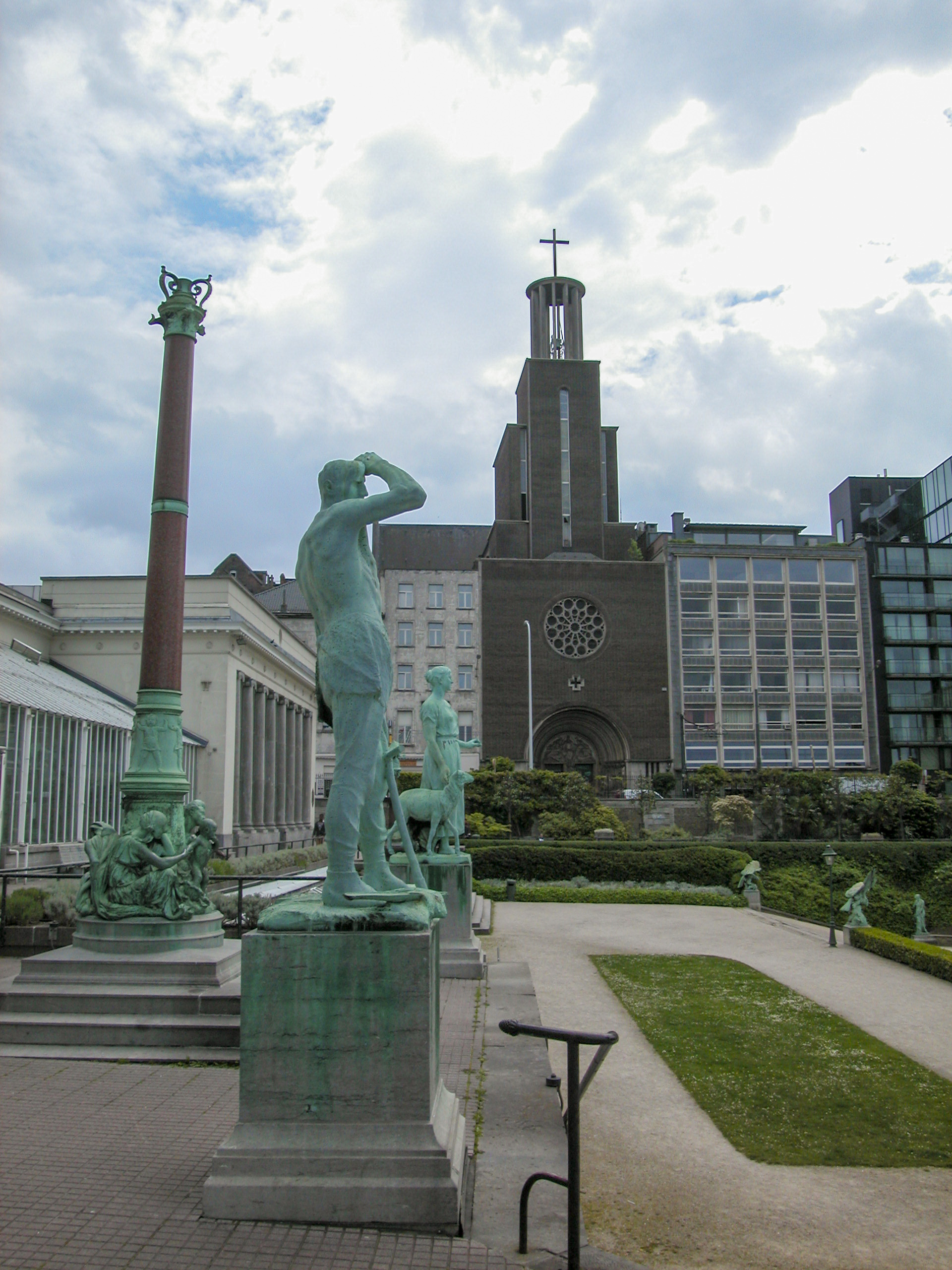 Saint-Josse-ten-Noode, Belgium